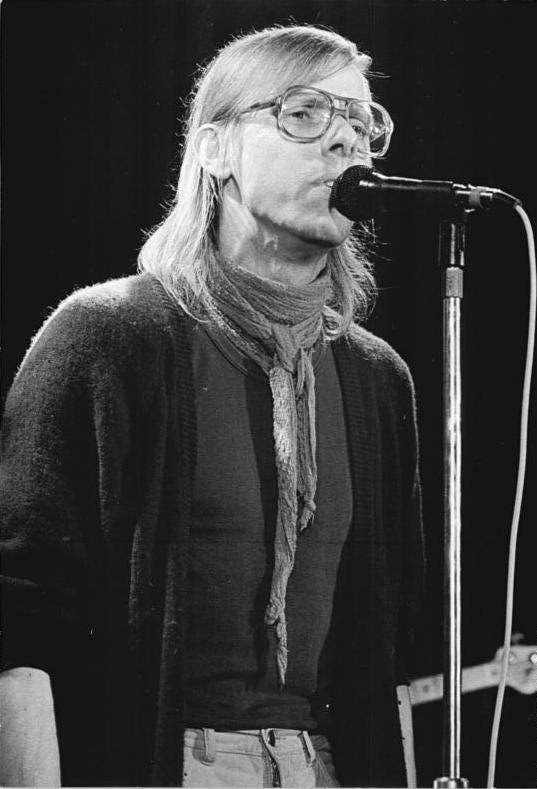 ADN-ZB Weisflog 14.11.89 Cottbus: Der Liedermacher Gerhard Gundermann unternimmt zur Zeit gemeinsam mit Reinhard Drogla und Reinhold Andert eine Tournee durch acht DDR-Städte. Gundermann, der hauptberuflich als Bergmann in einem Tagebau bei Hoyerswerda arbeitet, wurde 1988 bei den Chansontagen in Frankfurt-Oder mit dem Hauptpreis ausgezeichnet. Im vorigen Jahr erschien auch seine LP. Wegen seines kompromißlosen Auftretens hatte der Liedermacher in seinem Heimatbezirk bis vor kurzem einen schweren Stand.